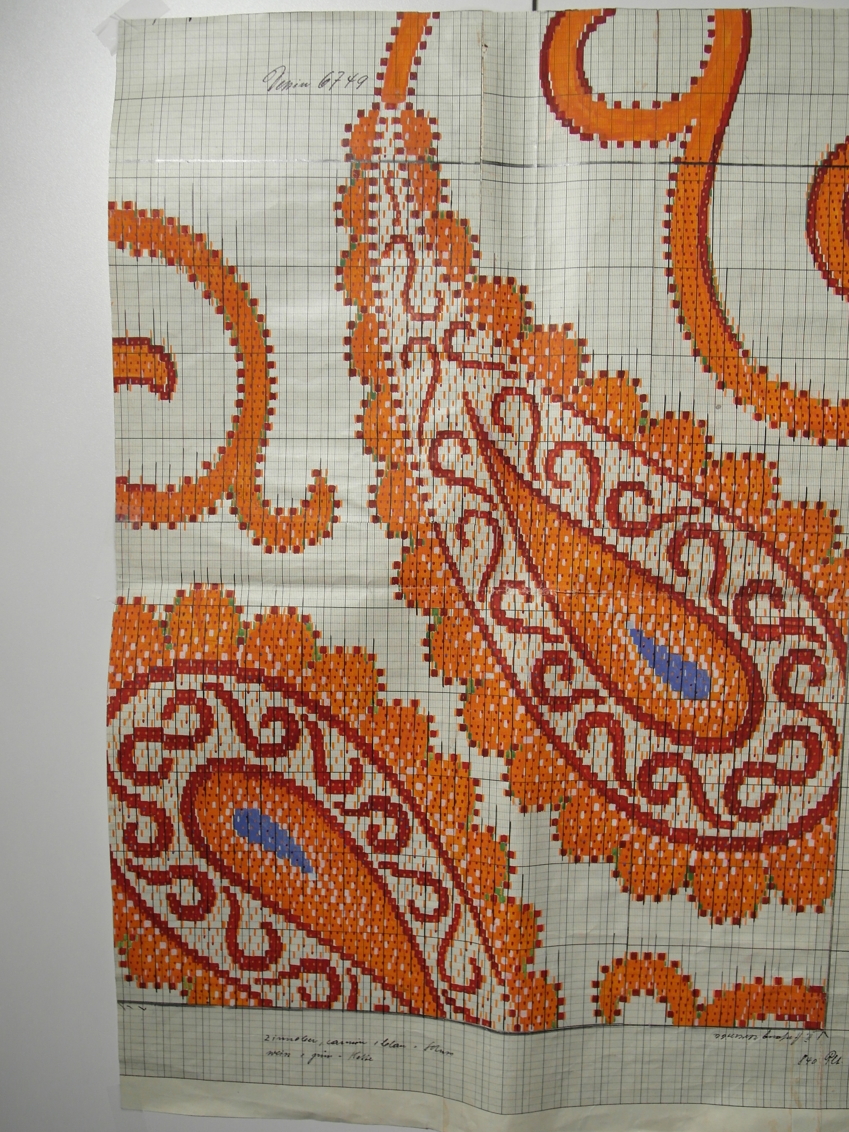 Stehli Seiden, Obfelden ZH, Schweiz